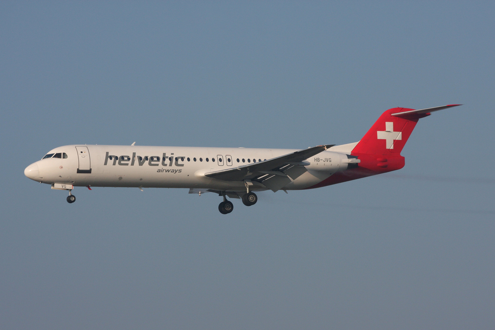 Zürich (- Kloten) (ZRH / LSZH) Switzerland 3.2016